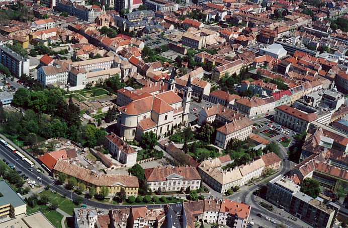 Szombathely - Vas megye - Hungary - Europe